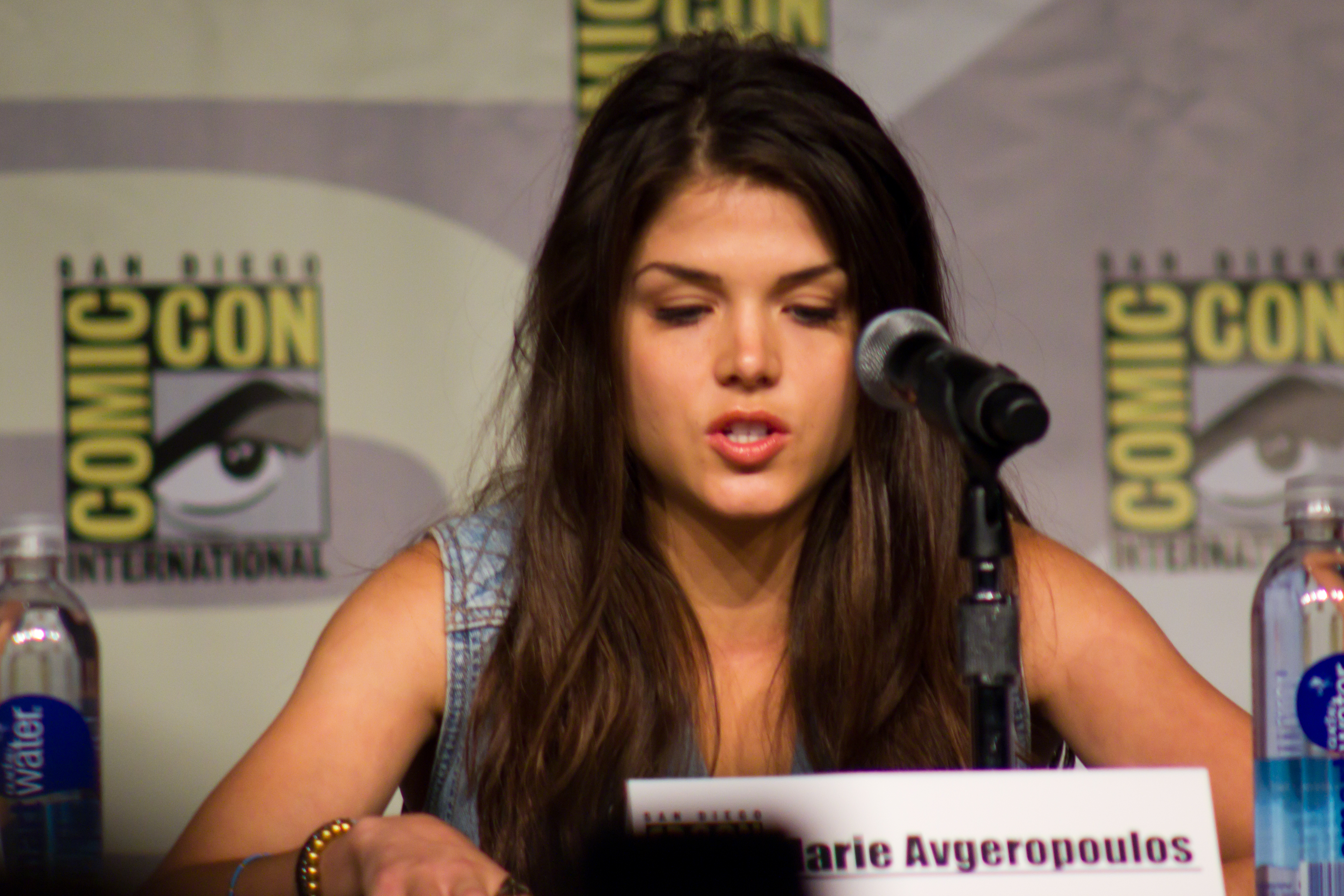 Marie Avgeropoulos